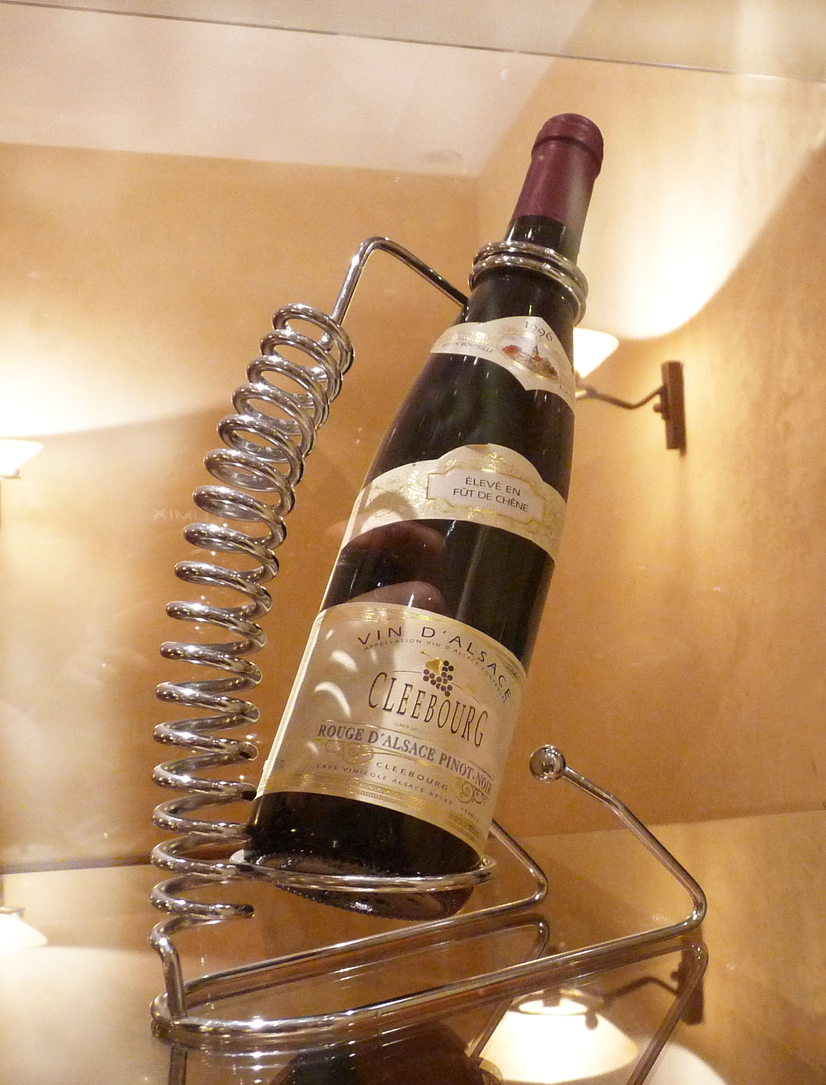 Bouteille de Pinot noir à la Cave vinicole de Cleebourg (Bas-Rhin)